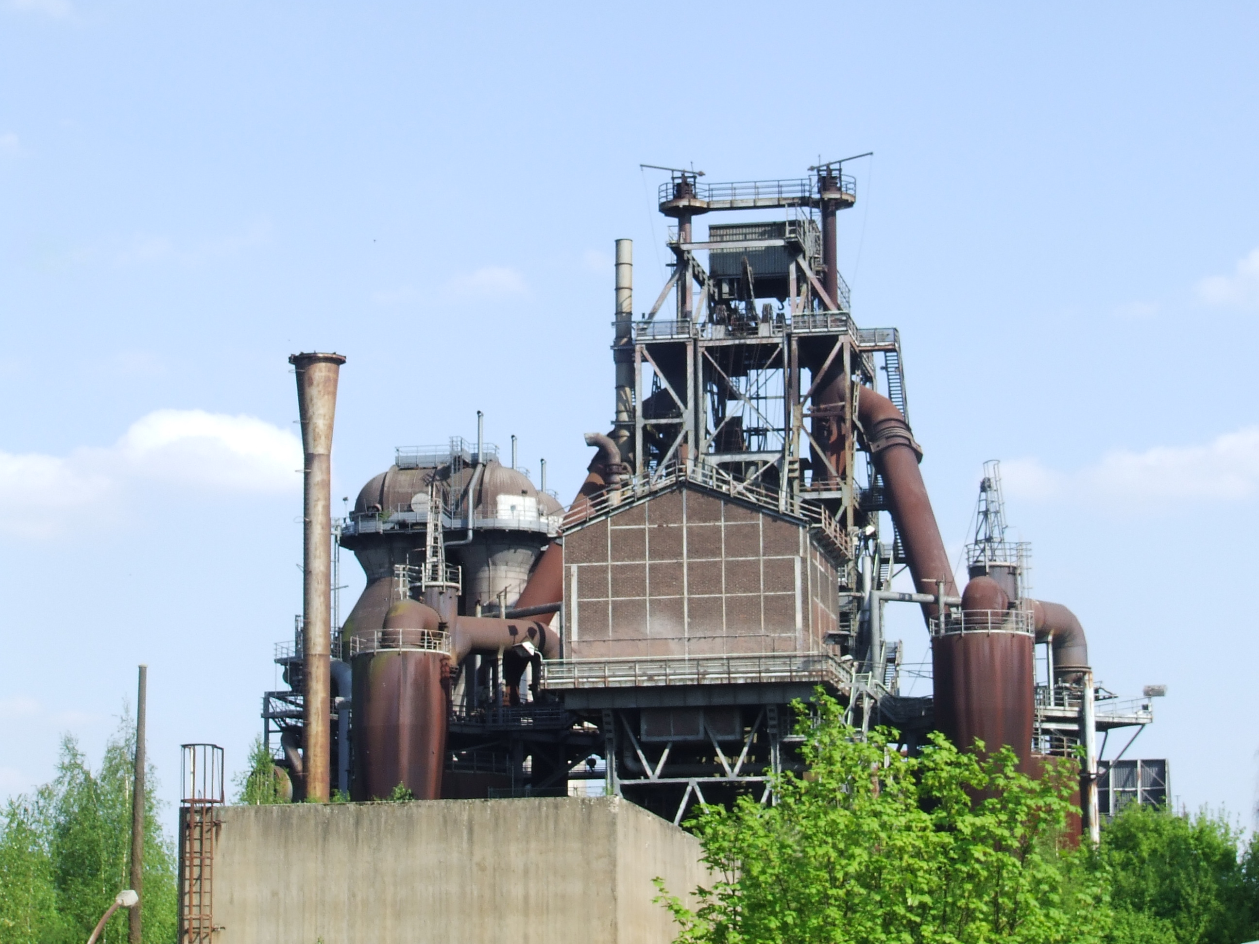 Landschaftspark Duisburg-Nord Hochofen - Frontalaufnahme